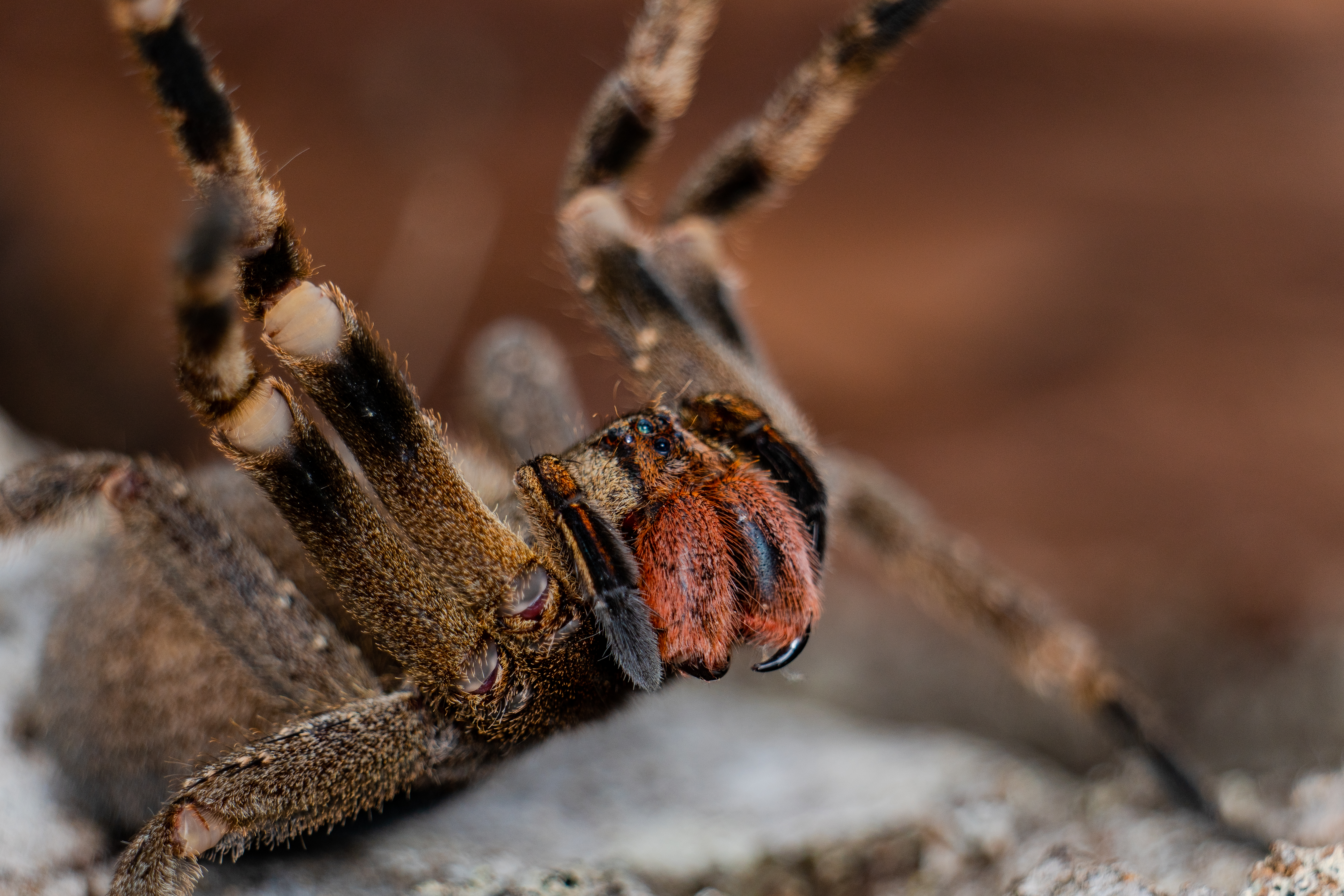 Estação Ecológica de Santa Bárbara de nível Estadual, localizado (a) em Águas de Santa Bárbara (SP)